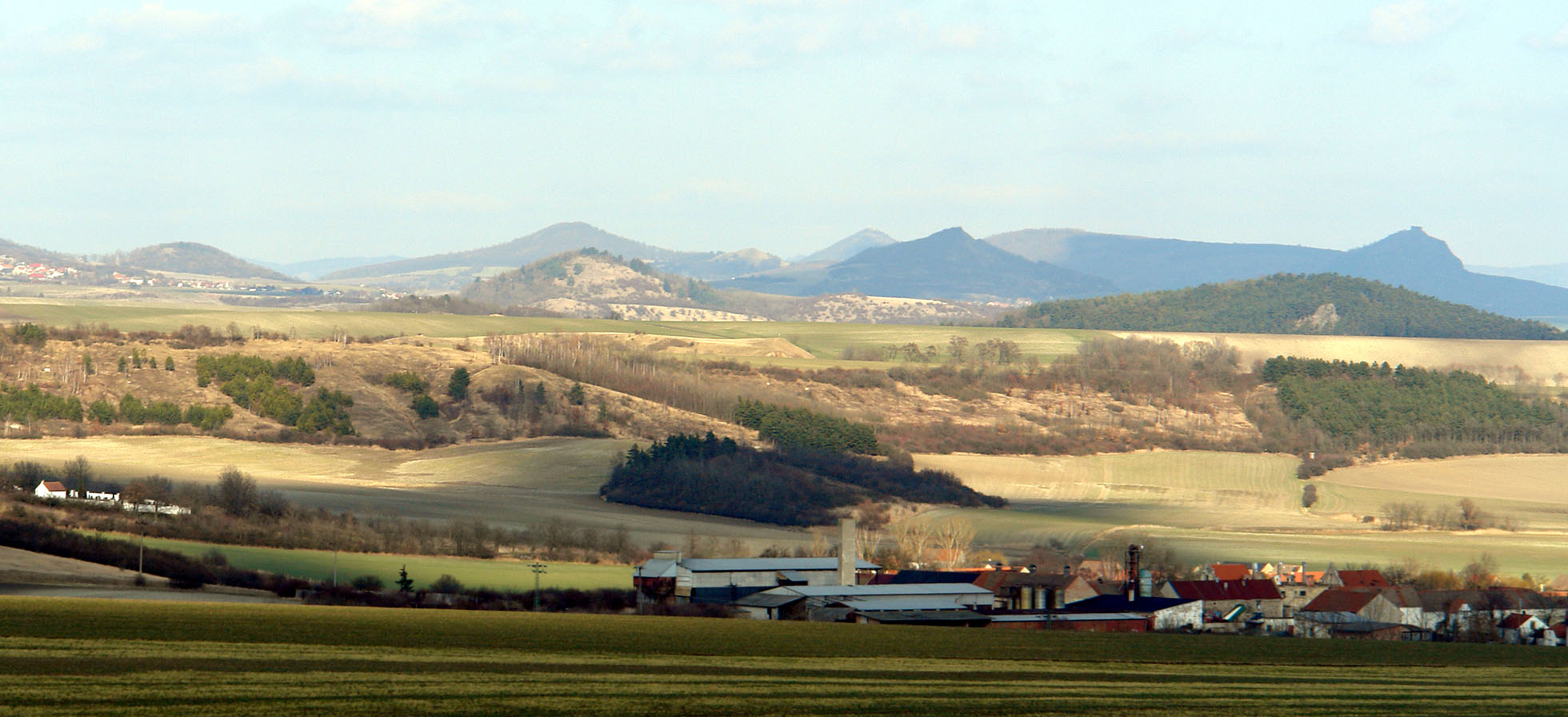 PP Třtěnské stráně